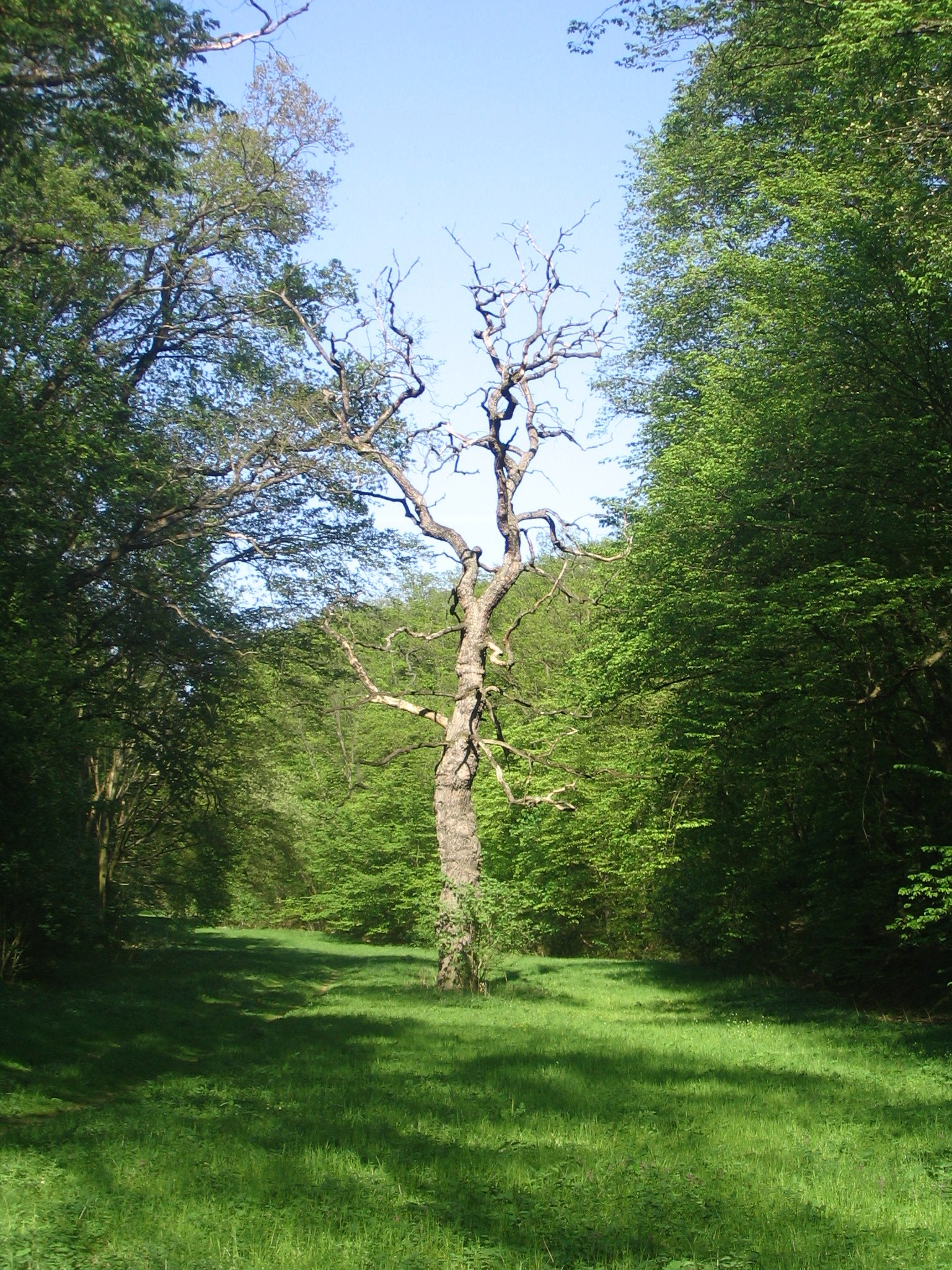 Suchý strom ve Slavičím údolí